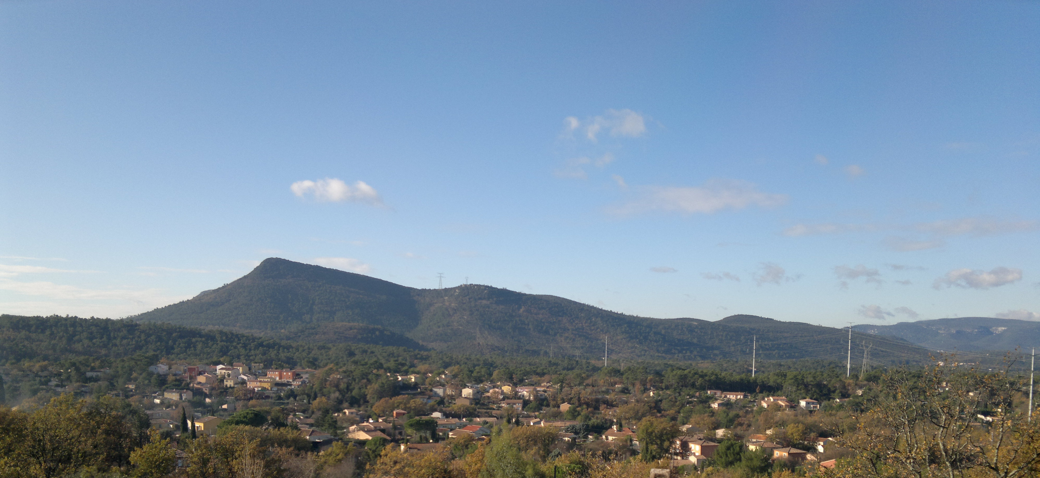 83136 Rocbaron, France